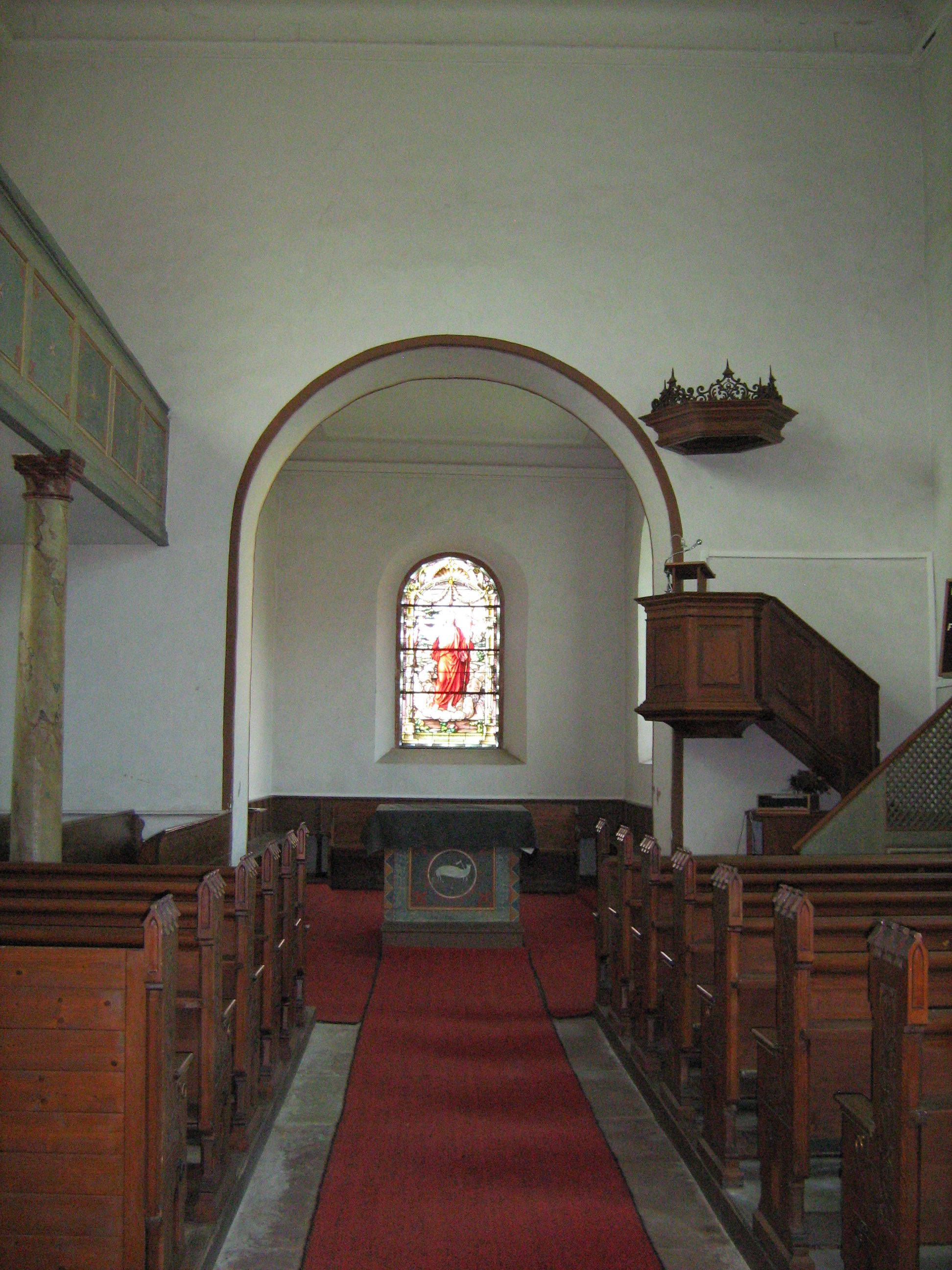 choeur de l'eglise d'Altdorf à Alteckendorf